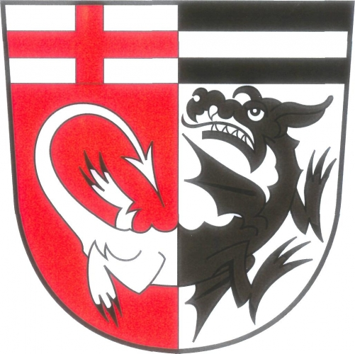 Znak, Mladějov na Moravě, okres Svitavy